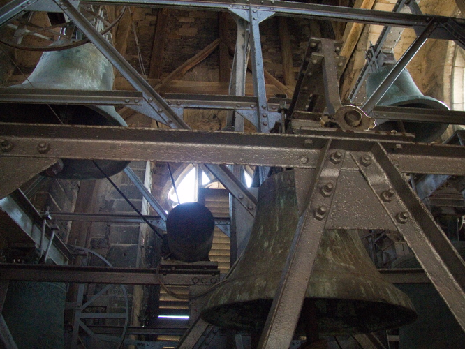 Glockenstuhl der St. Stephanikirche zu Aschersleben. Vorne: kleine Glocke (Nr. 6), links unten: Lutherglocke (Nr. 3), darüber: Sonntagsglocke (Nr.2), rechts unten: Kammerglocke (Nr. 1), darüber: Abendglocke (Nr. 4).